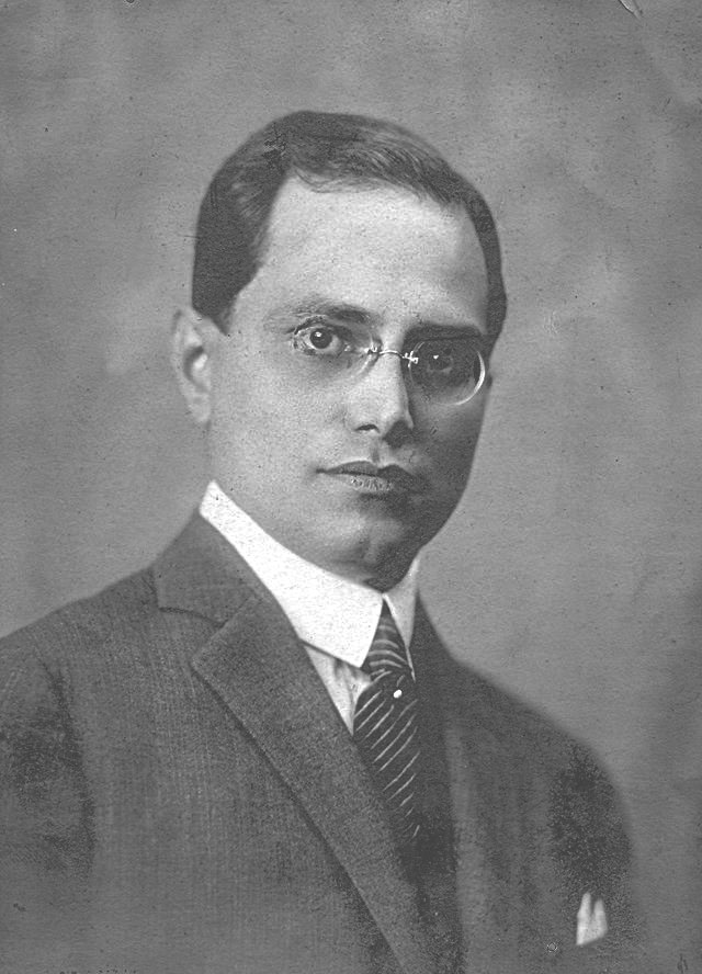 Pontes de Miranda. Retoque digital.